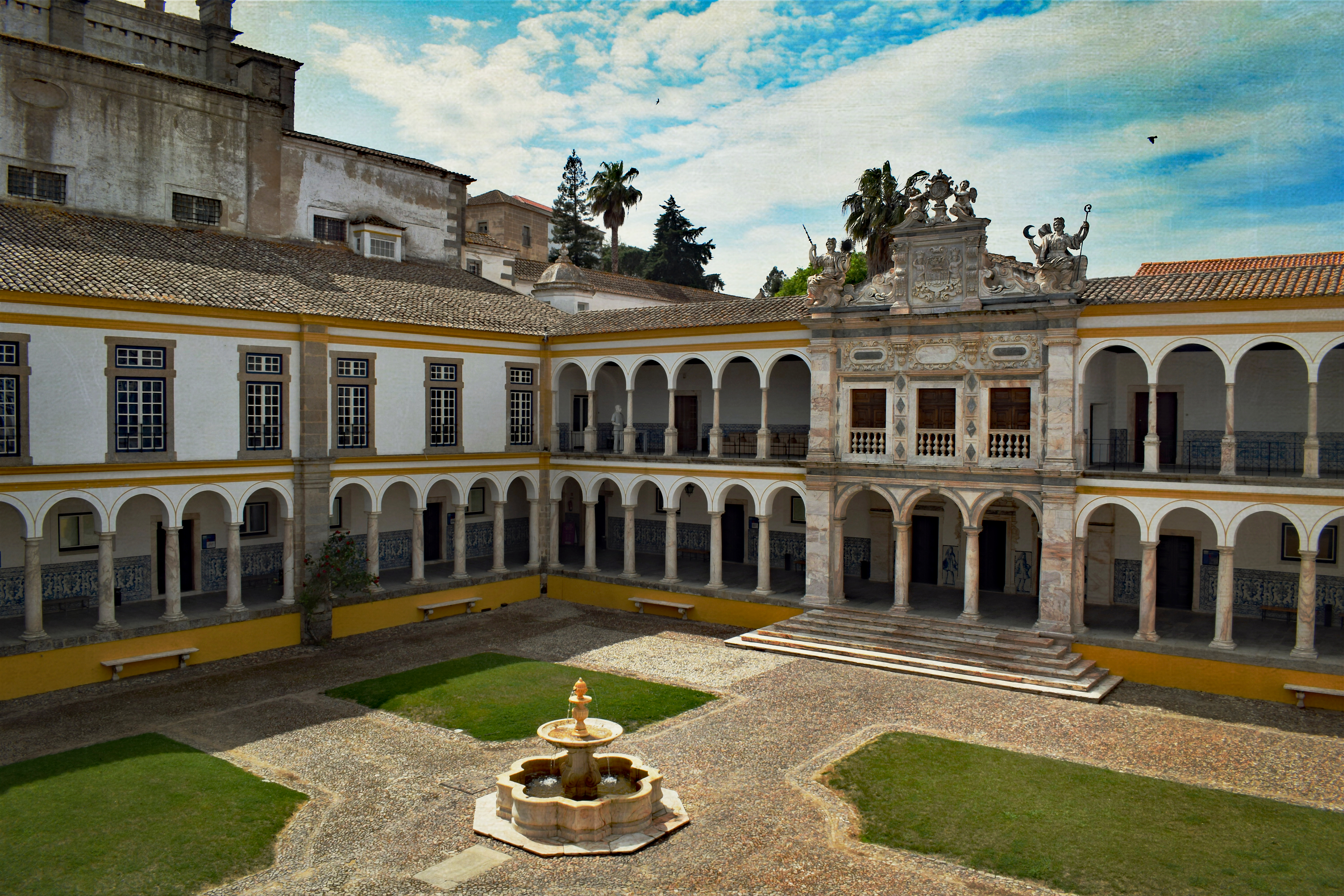 Texture: Lenebem Anna